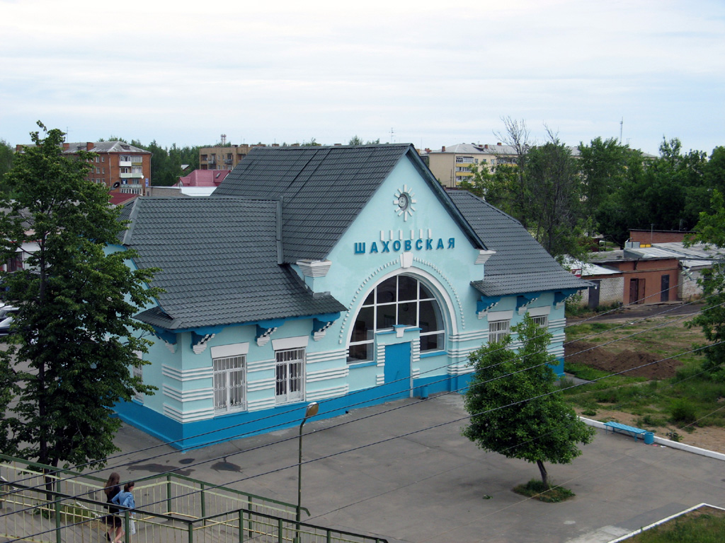 здание вокзала; railway station